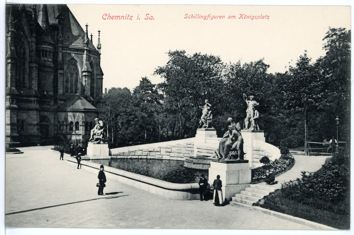 Chemnitz; Schillingfiguren am Königsplatz This postcard is from publisher Brück & Sohn in Meißen ( postcard has a unique number 15618 and is available in a higher resolution at the publisher. This images was uploaded in a cooperation project between Wikipedians and the publisher.